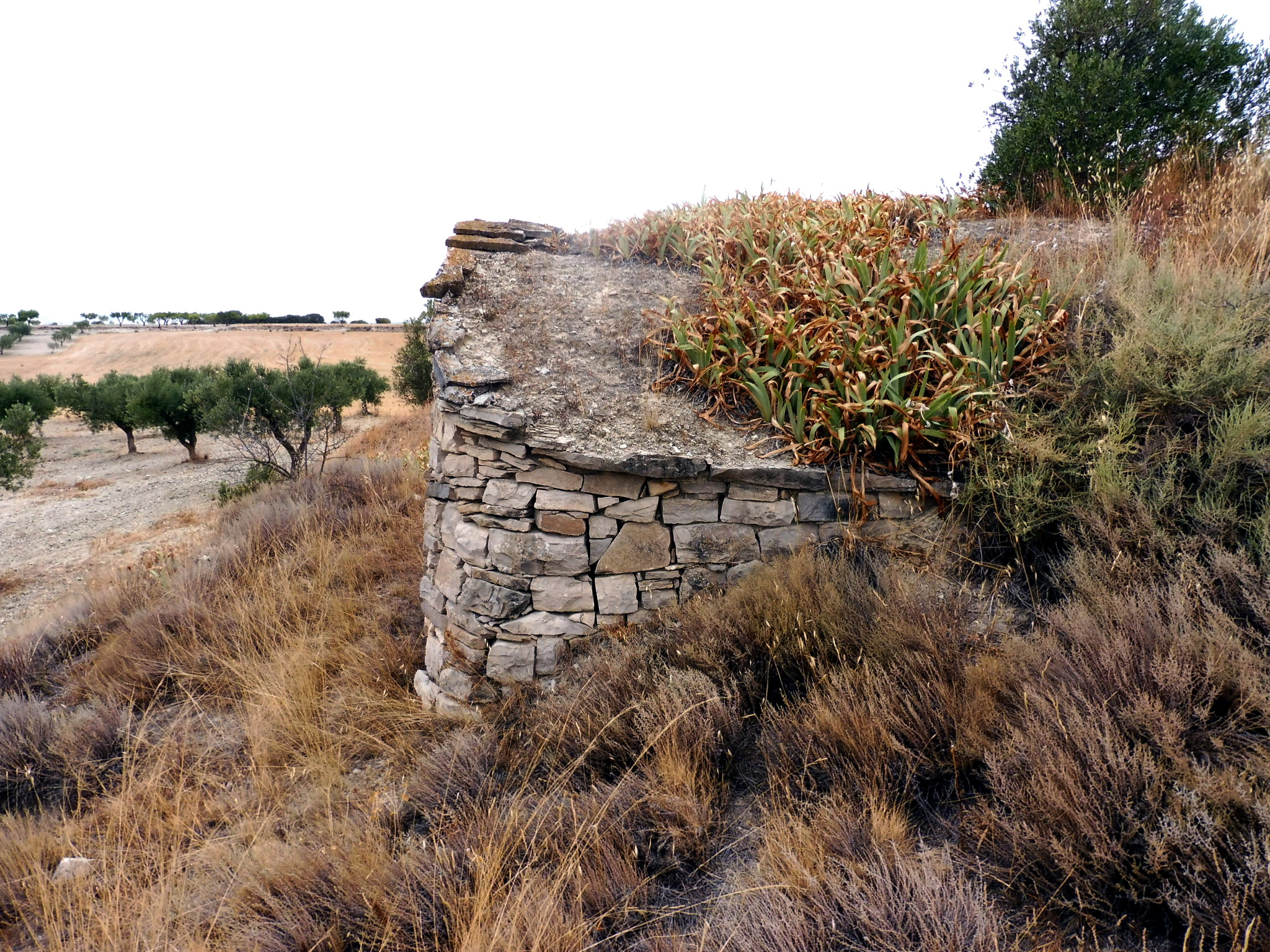 Cabana en volta del Sàrries (Granyena de Segarra) This is a a photo of a natural area in Catalonia, Spain, with id: ES510254